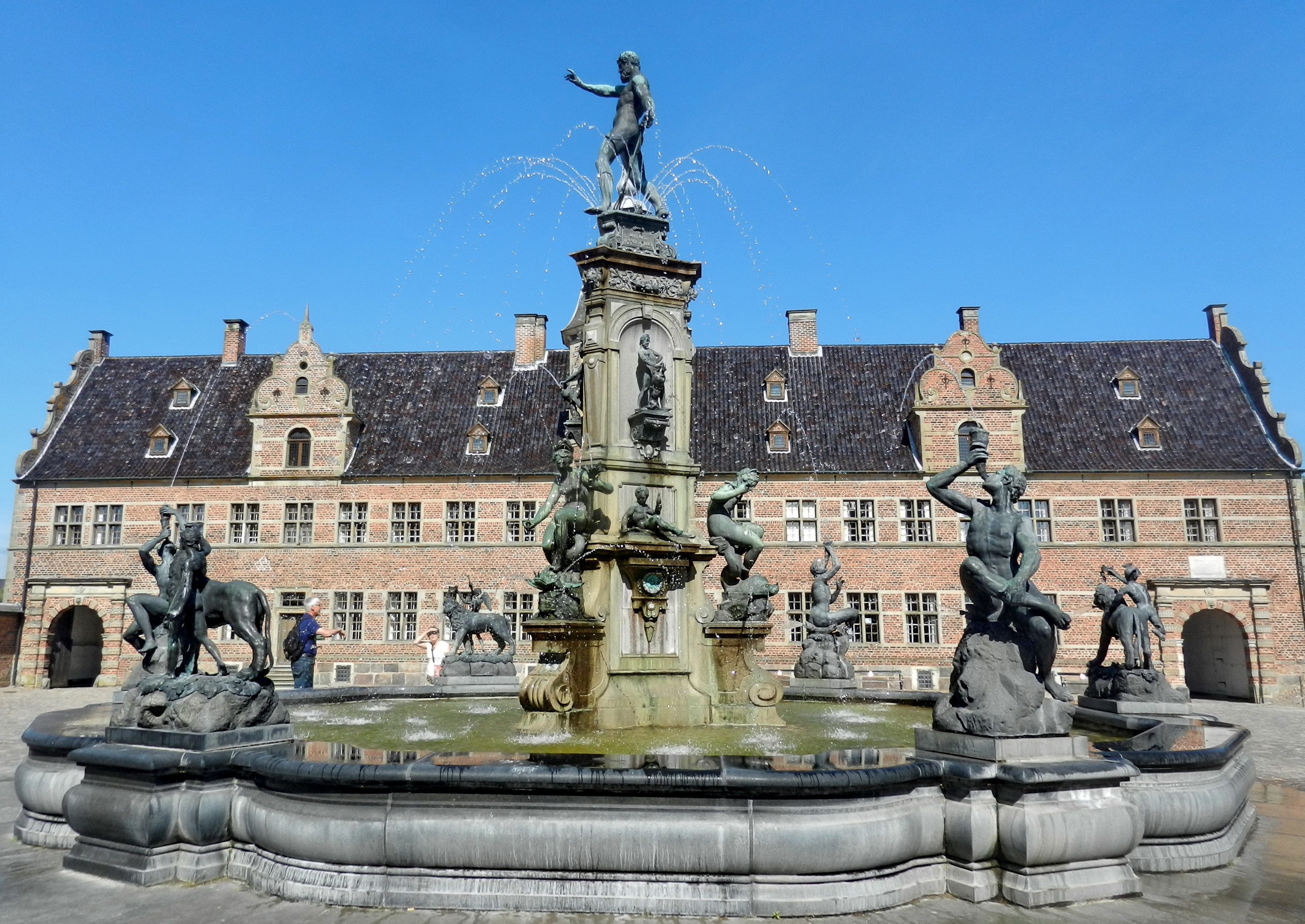 Frederiksborg castle